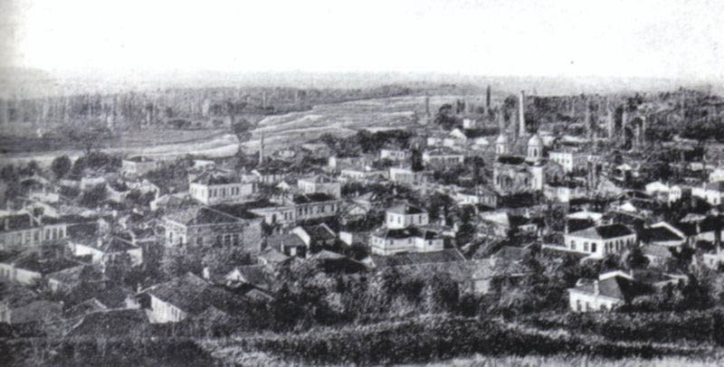 Асеновград през 1900г. Автор неизвестен